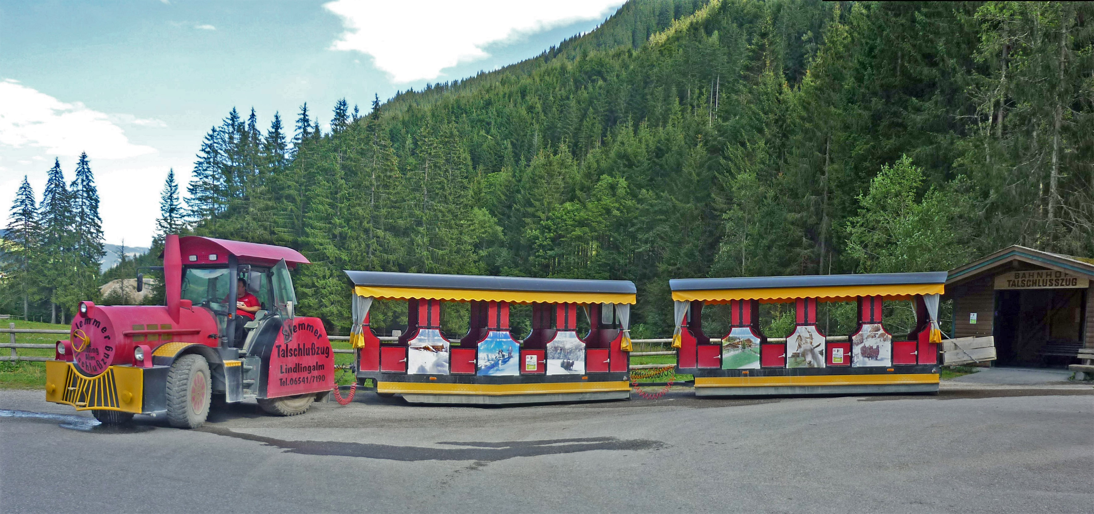 Talschlusszug im Hinterglemmtal (Saalbach-Hinterglemm)